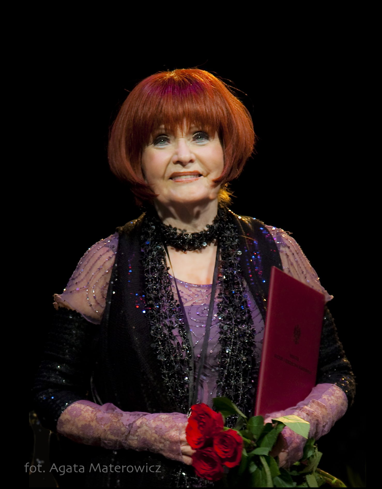 Jubileusz 65 lecia pracy artystycznej Barbary Krafftówny, Warszawa, Teatr Dramatyczny. 18 maja 2010 r.